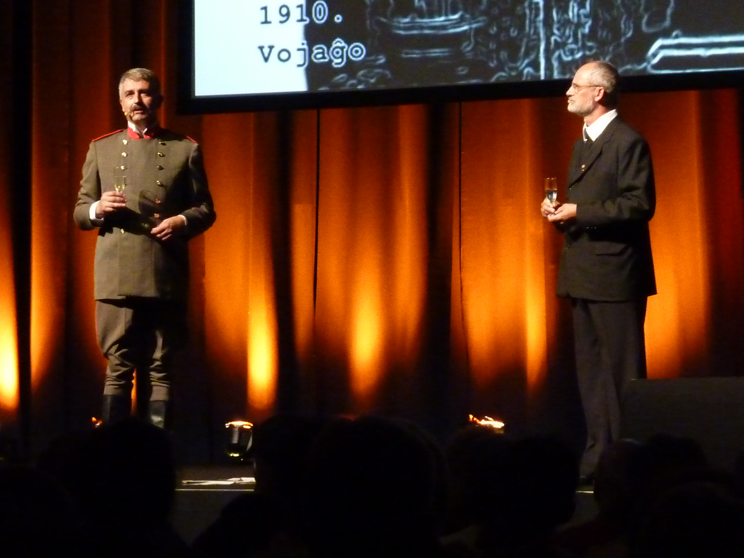 Teatraĵo "Dek tagoj de kapitano Postnikov" surscenigita dum la 96-a UK en Kopenhago (2011).